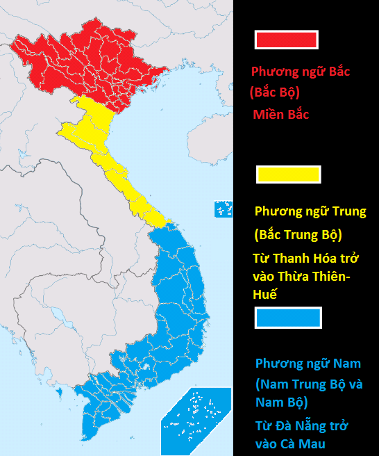 Phương ngữ tiếng Việt trên các vùng miền của Việt Nam.